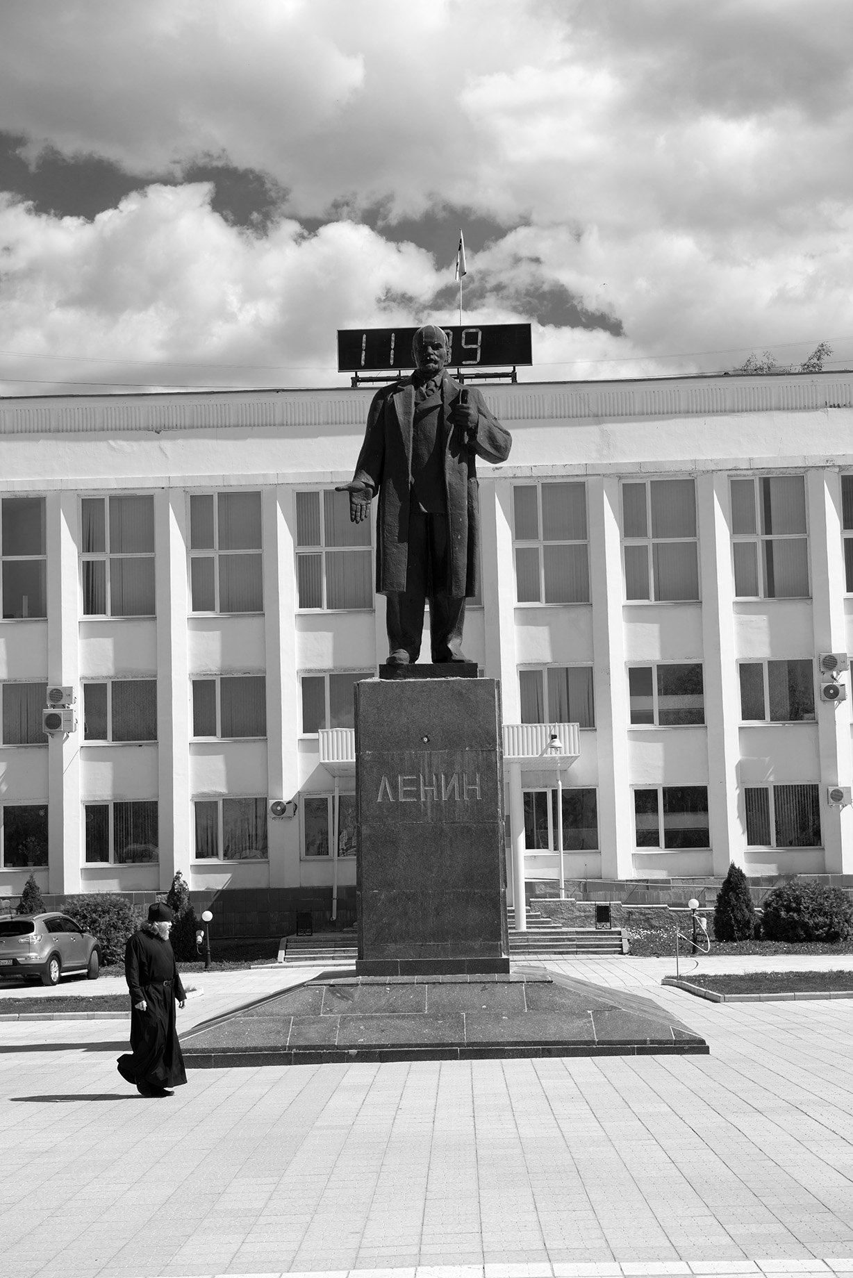 Ленинское